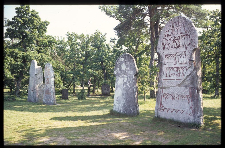 Bunge 77:2. Bildstenssamling på Bungemuseet från bl. a. Lärbro. Motiv: Bildsten Bunge 77:2a Kategori: Bildristning Bunge 77:2. Bildstenssamling på Bungemuseet från bl. a. Lärbro. Bildsten Bunge 77:2a.